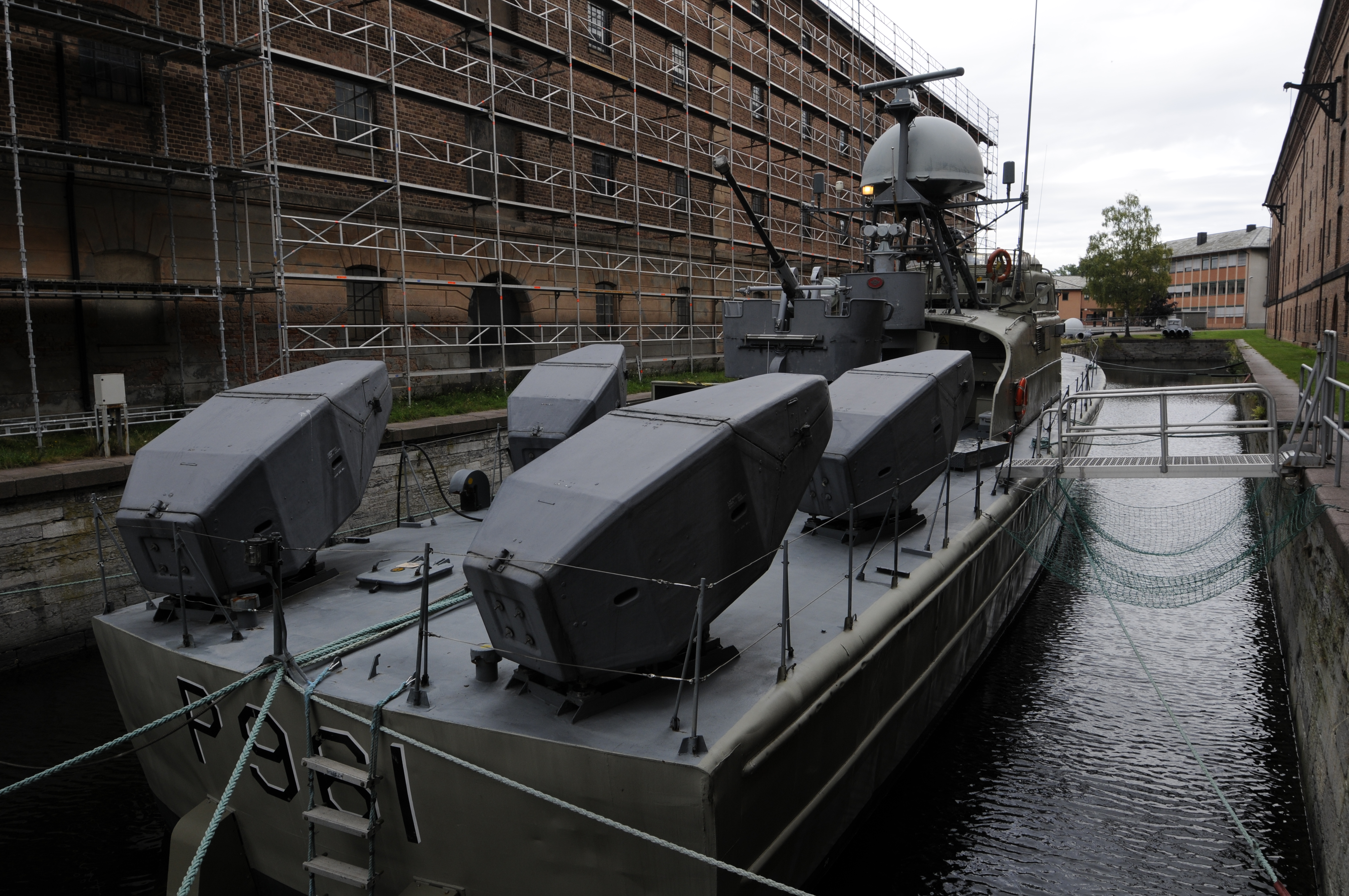 KNM «Blink» (P961) utenfor Horten marinemuseum